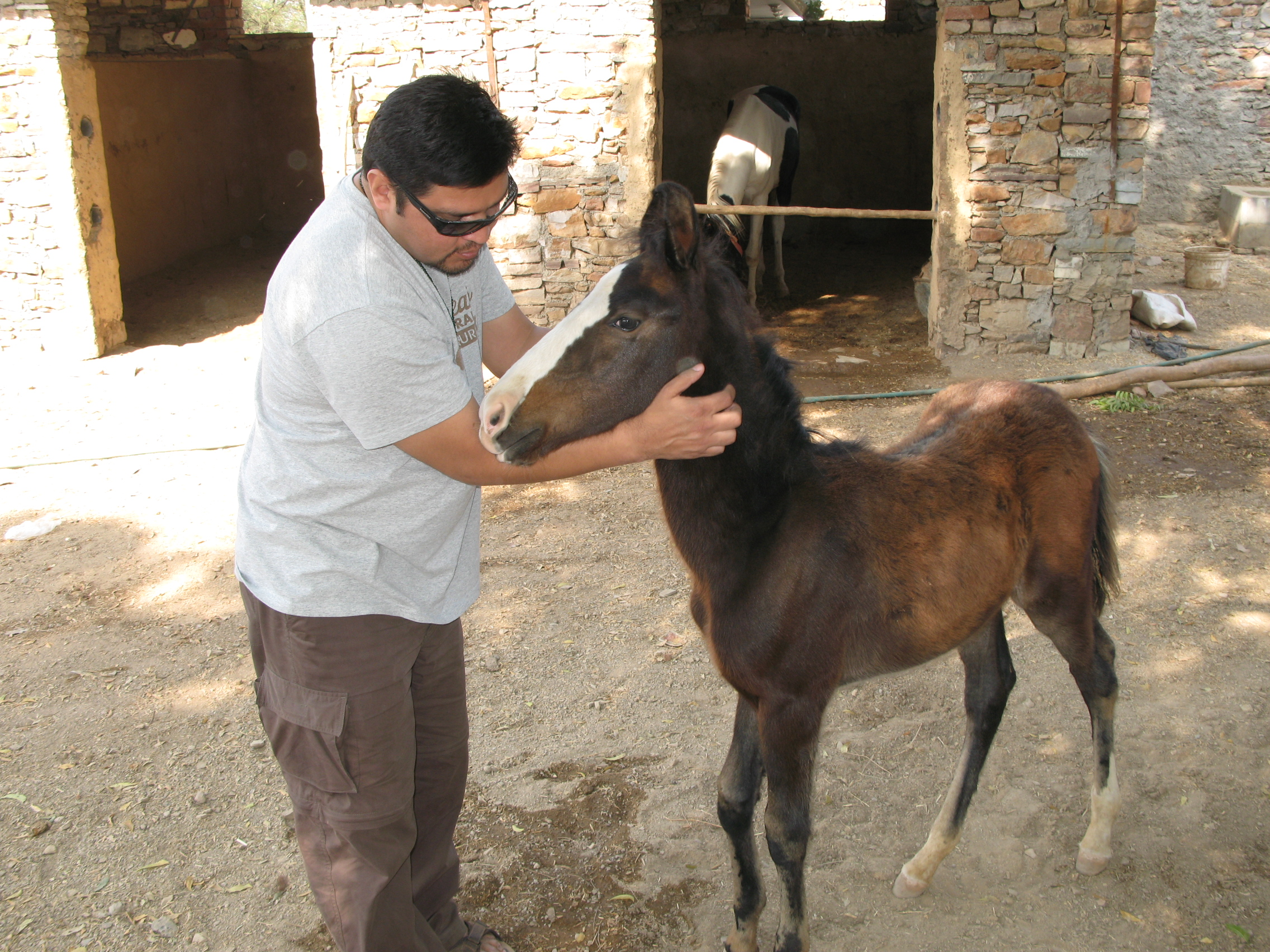 Marwari foal